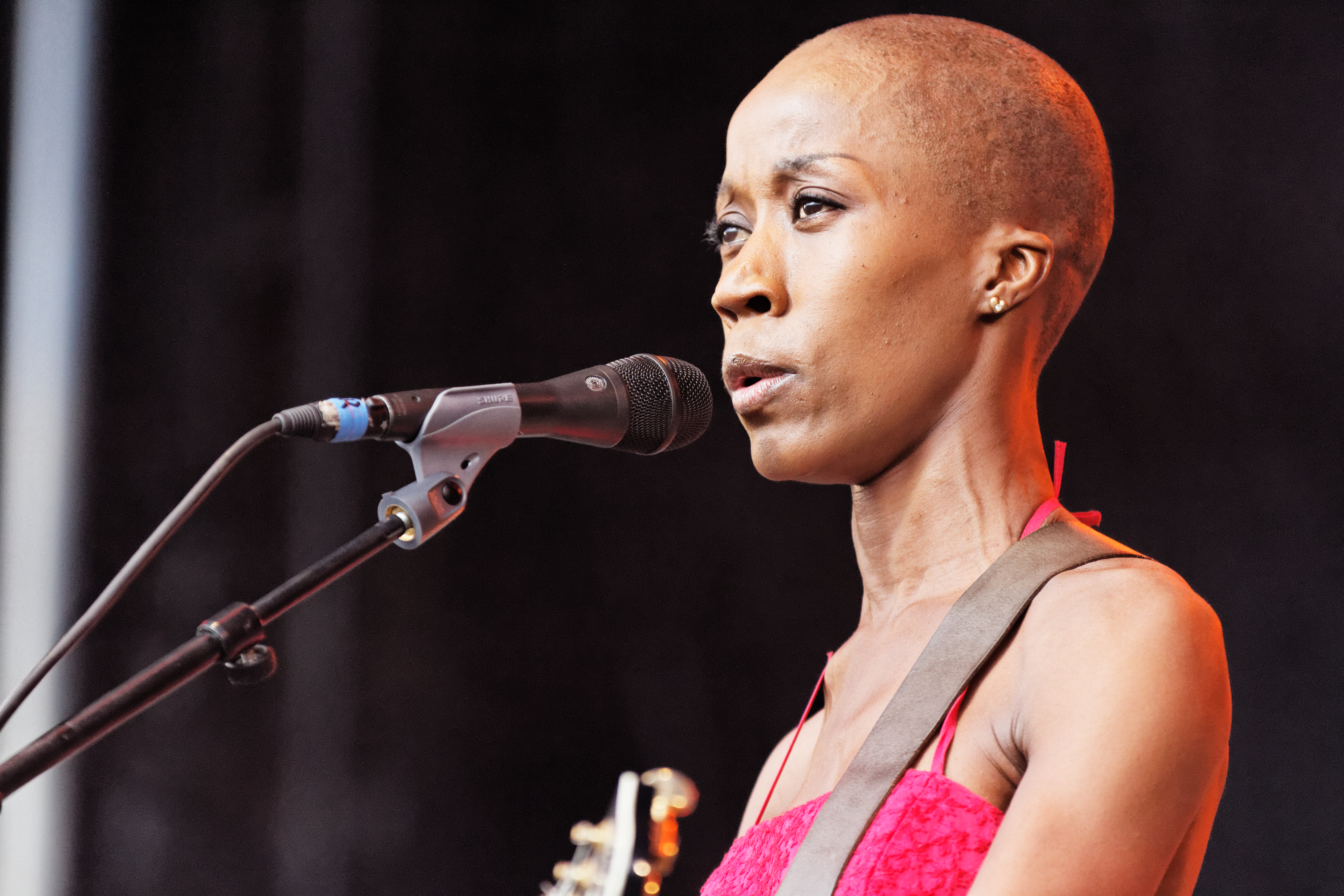 Rokia Traoré en concert sur la scène Landaoudec lors du festival du bout du Monde à Crozon dans le Finistère (France).